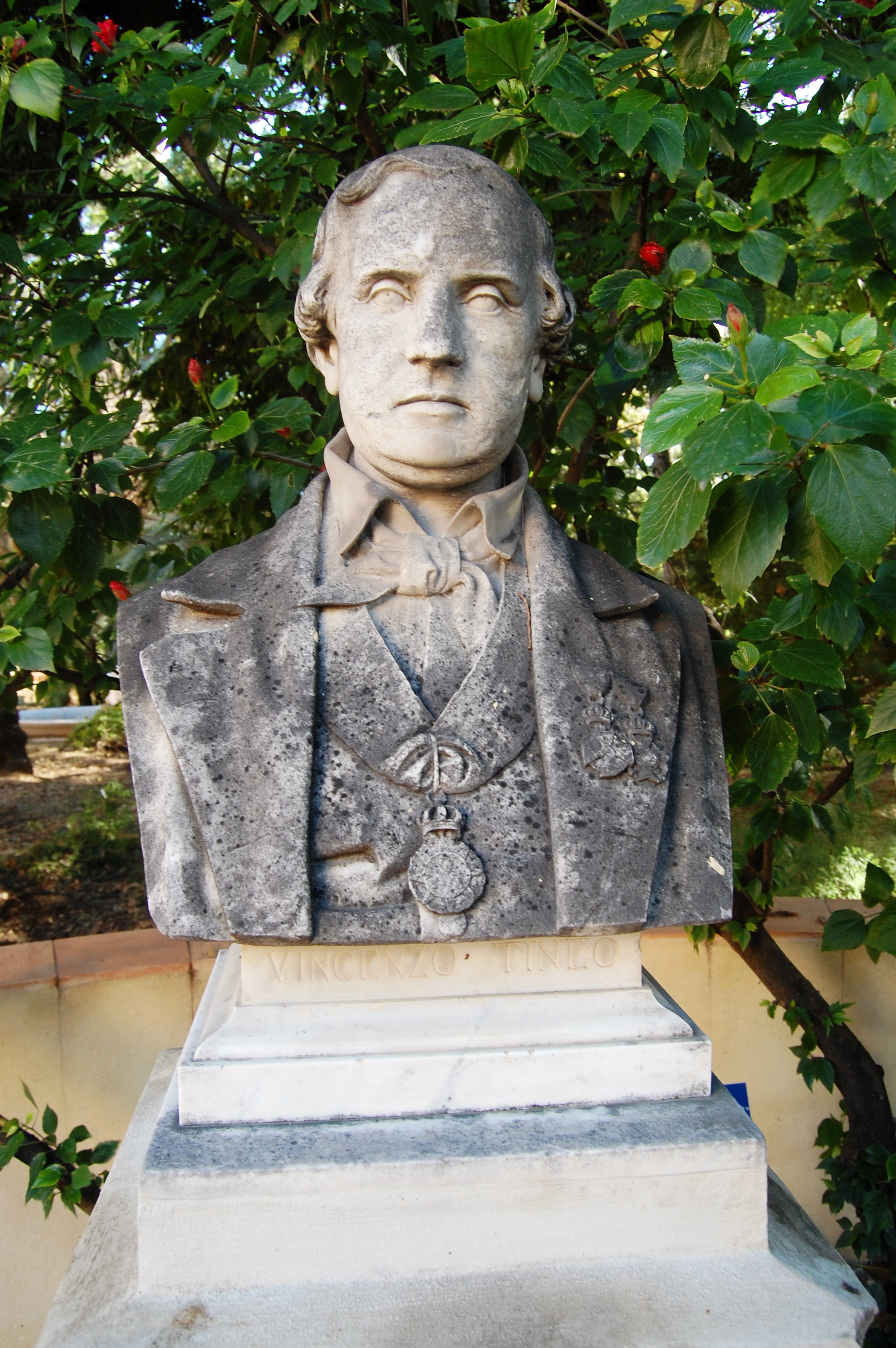 Vincenzo Tineo (1791-1856) Orto botanico di Palermo